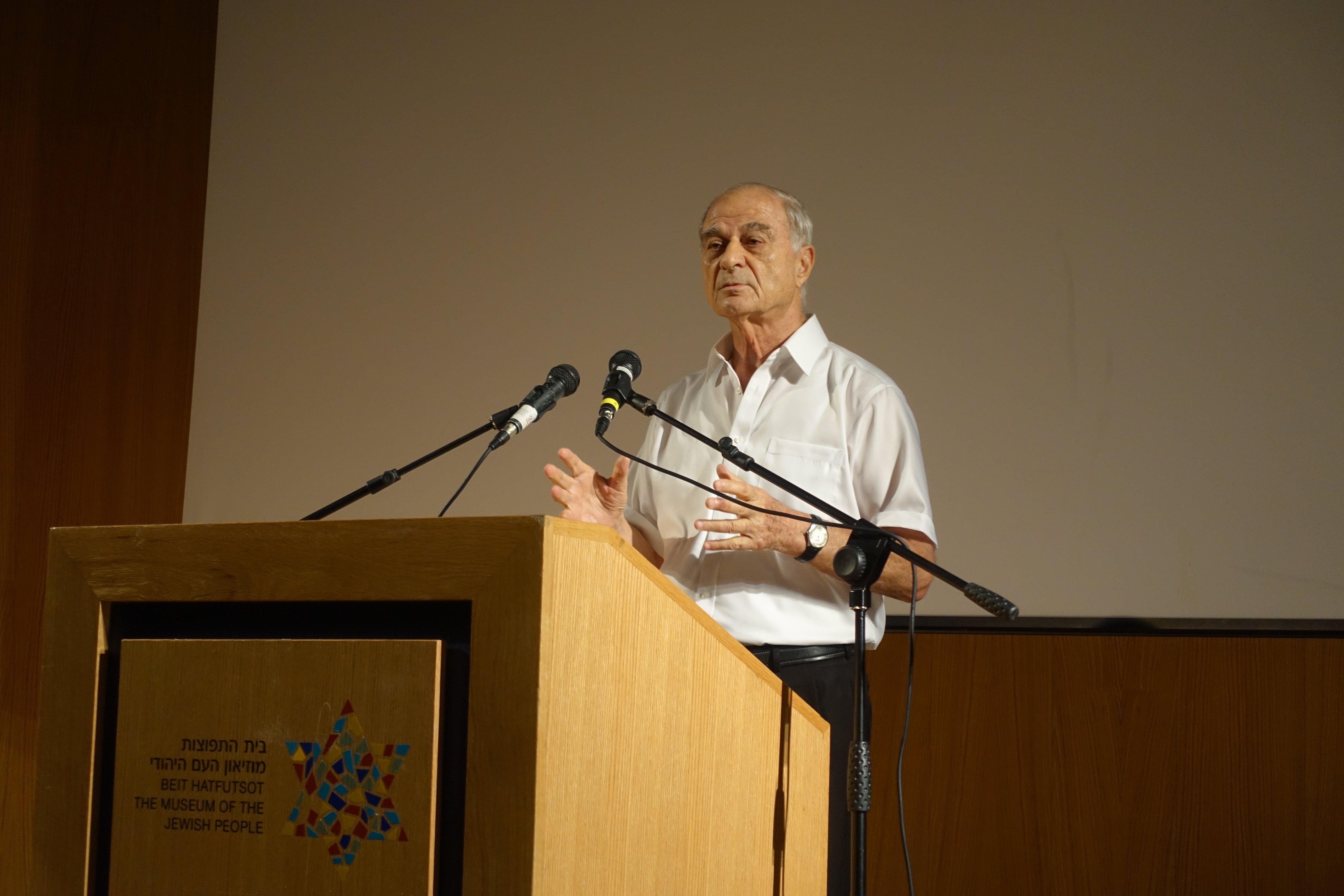 אוריאל לין בטקס השקת ספרו: לידתה של מהפכה בבית התפוצות, 2017